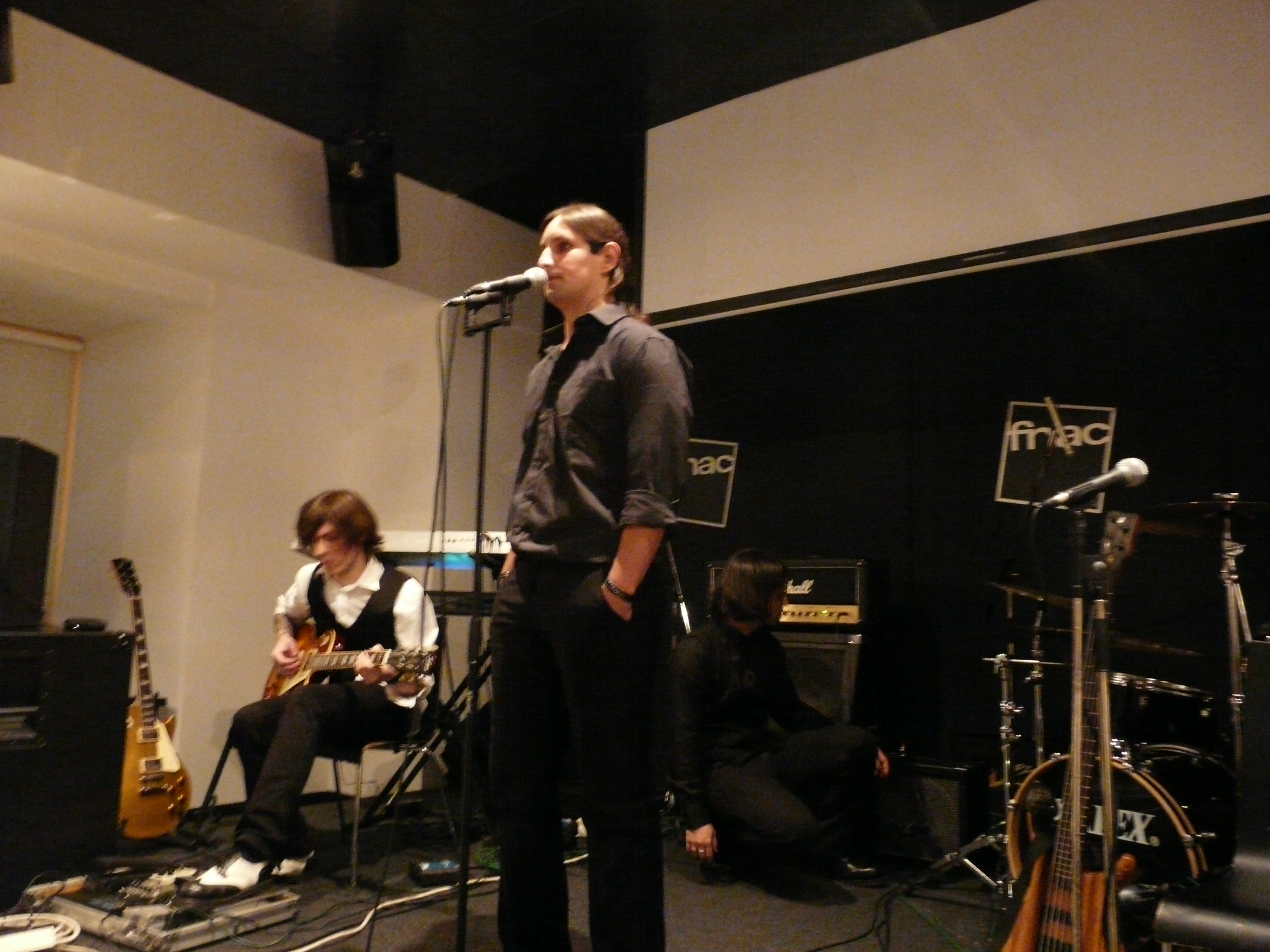 UT Live at fnac of Chiado in Lisbon